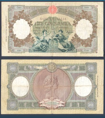 Banconota da 5000 lire italiana serie Repubbliche Marinare (1948-1964)